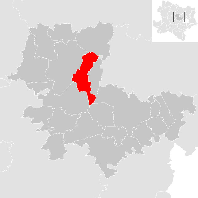 Bezirk Tulln